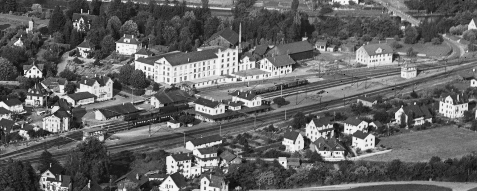 ehemaliger Inselbahnhof Turgi AG, Schweiz